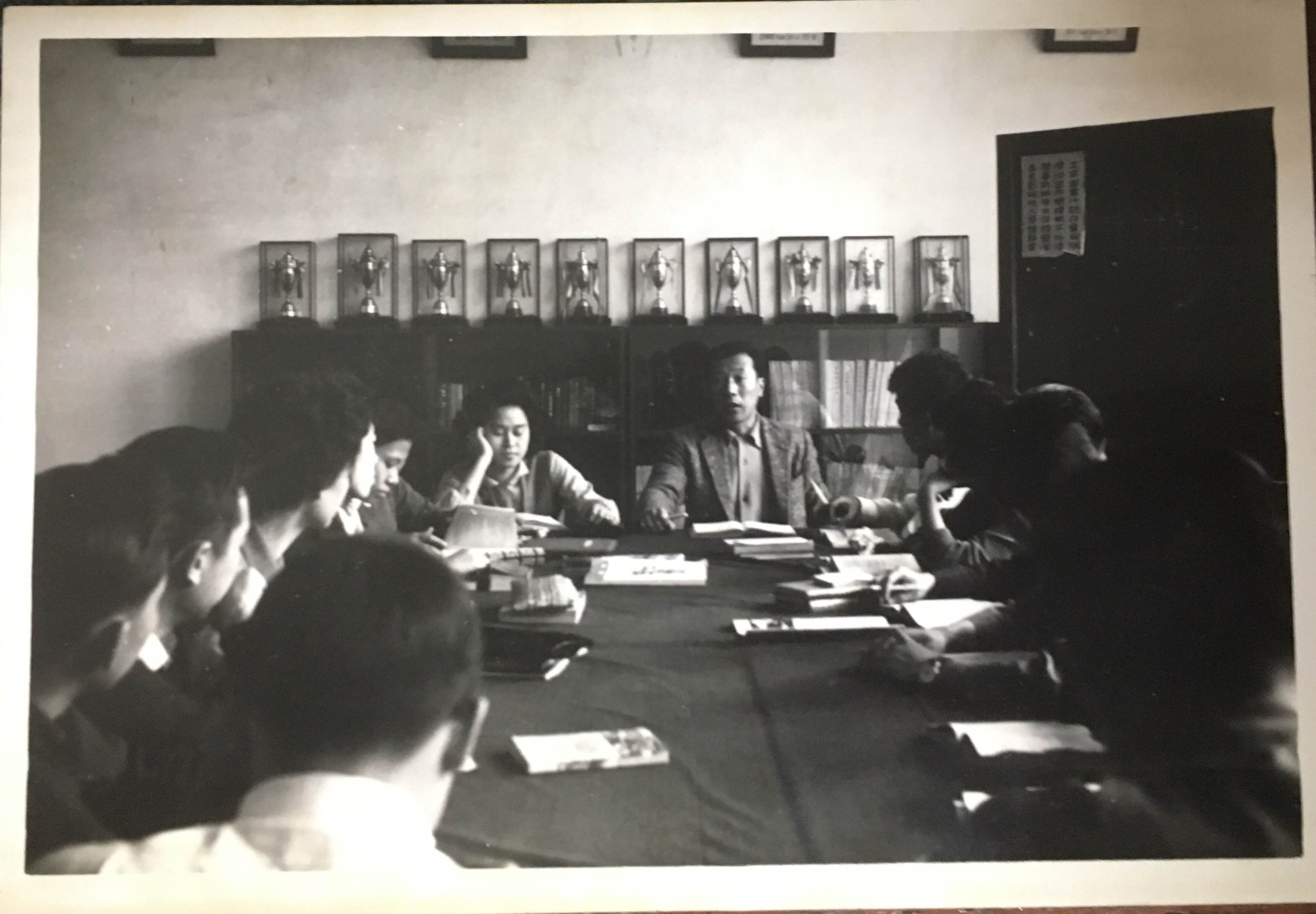 趙鳳培教授，時正在授課